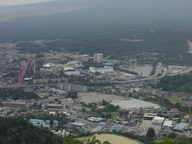 富士急ハイランドの全景写真